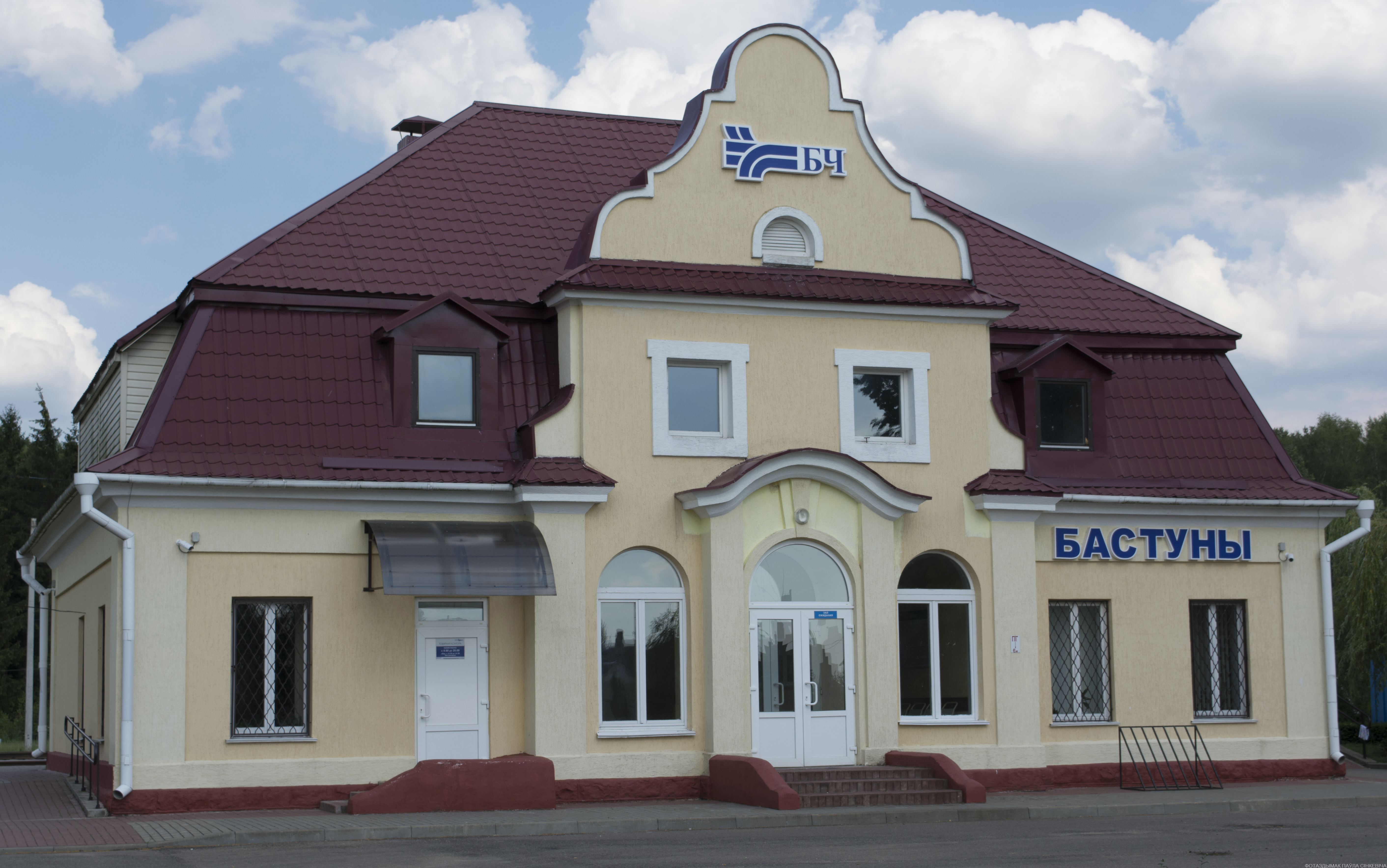 Бастуны чыгуначная станцыя